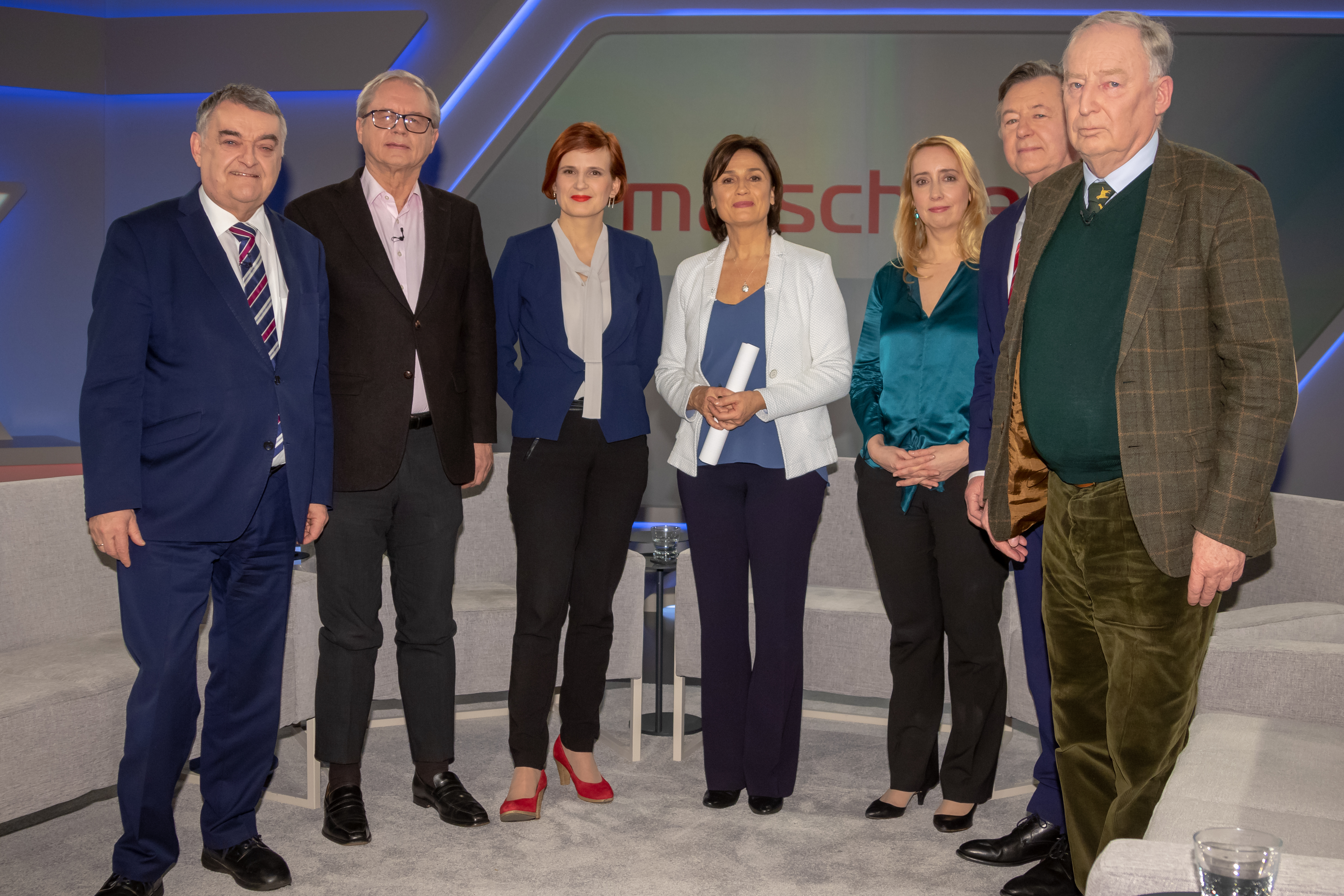 Gruppenfoto in der WDR-Sendung "Maischberger" am 2019-01-23